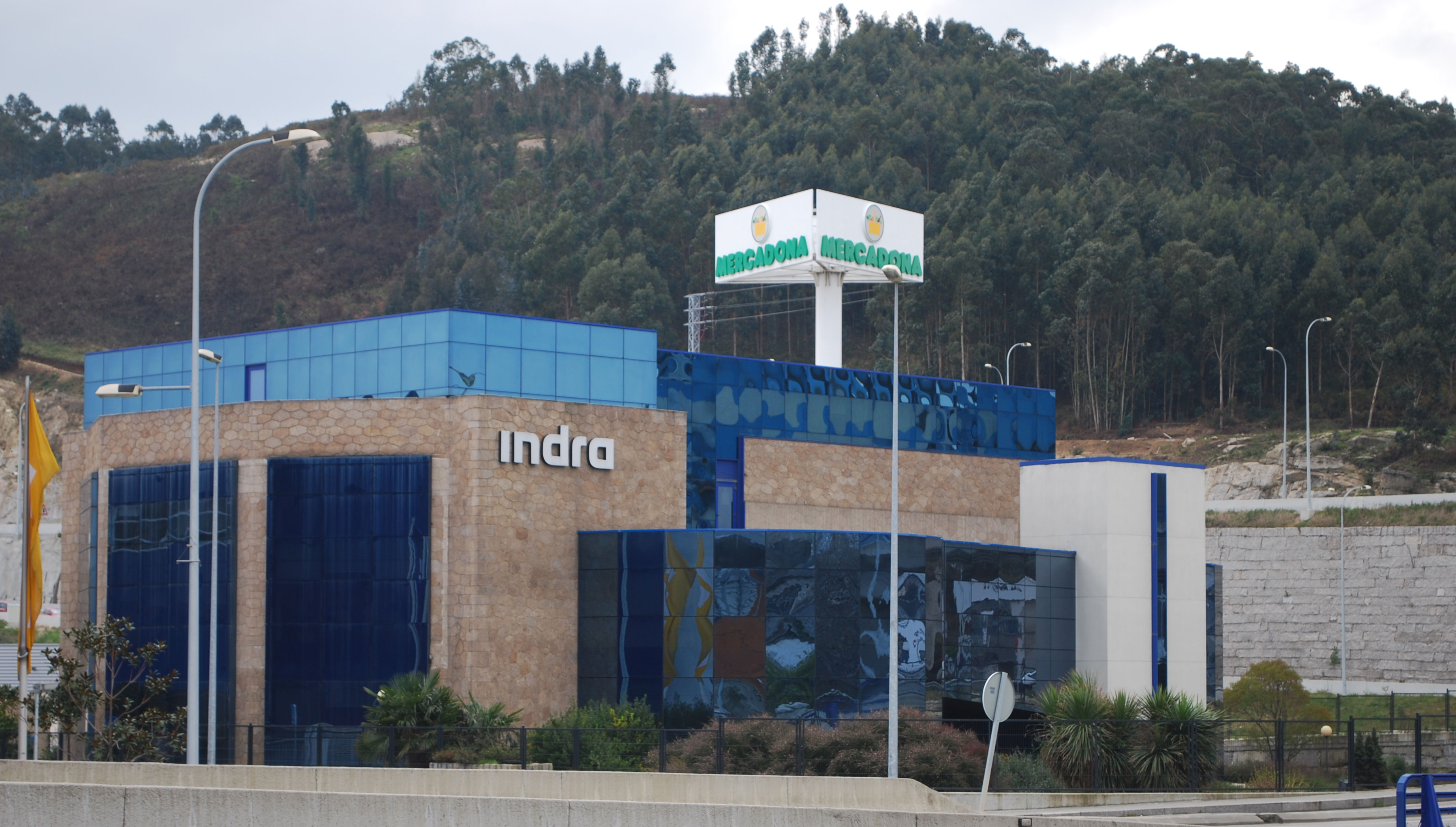 Sede de Indra en Agrela A Coruña Galiza Spain